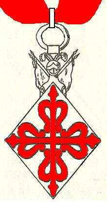 Eigen tekening Robert Prummel